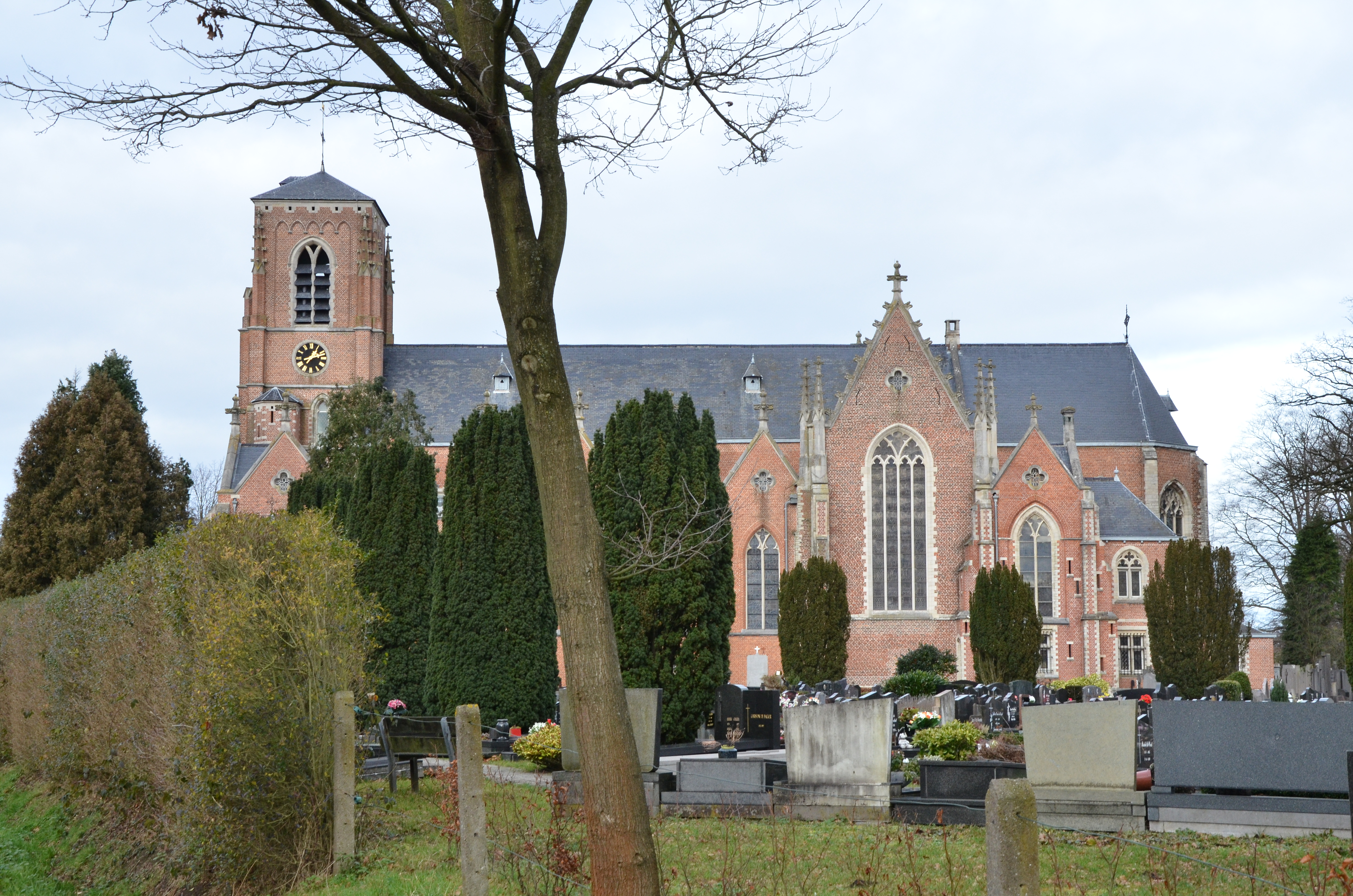 Parochiekerk Sint-Guibertus vanaf het zuiden